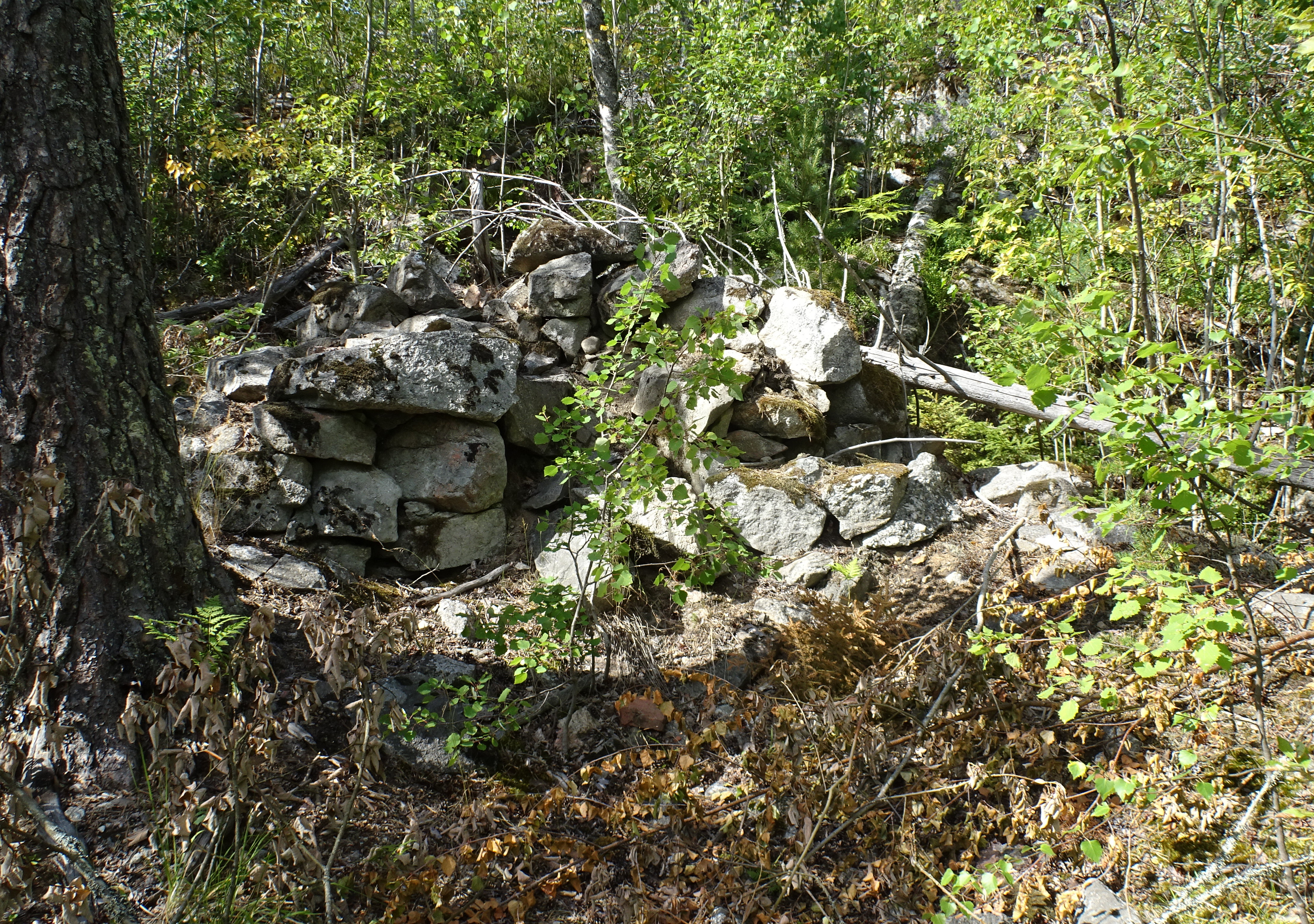 Rester efter en Ryssugn i Tyresta nationalpark (RAÄ-nummer Tyresö 116:1)